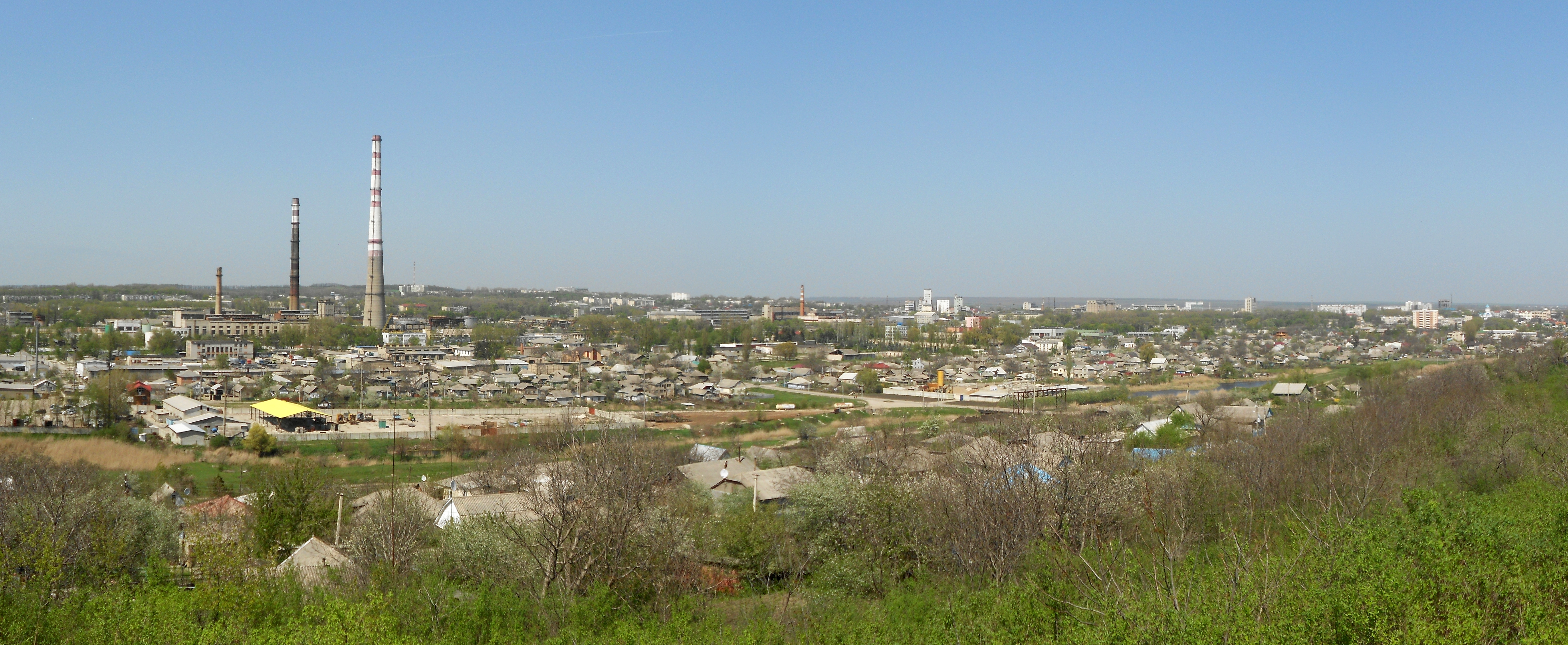 Panoramă a zonei industriale din mun. Bălți